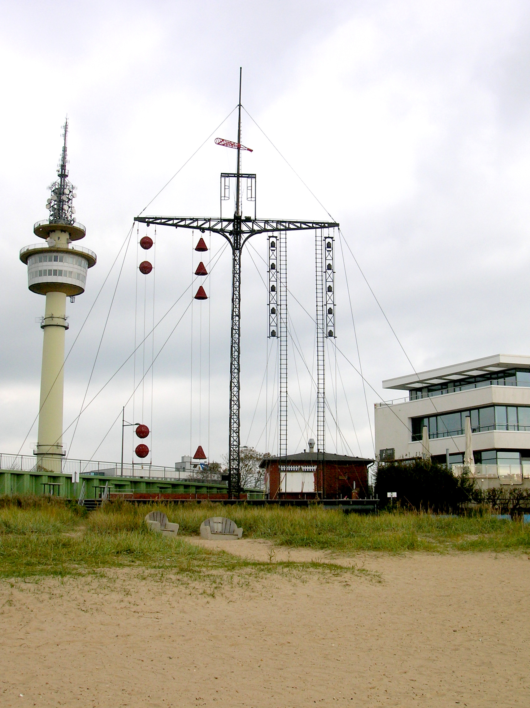 Wasserstandsanzeiger am Weserdeich in Bremerhaven (vor der Nordmole der Geesteeinfahrt).